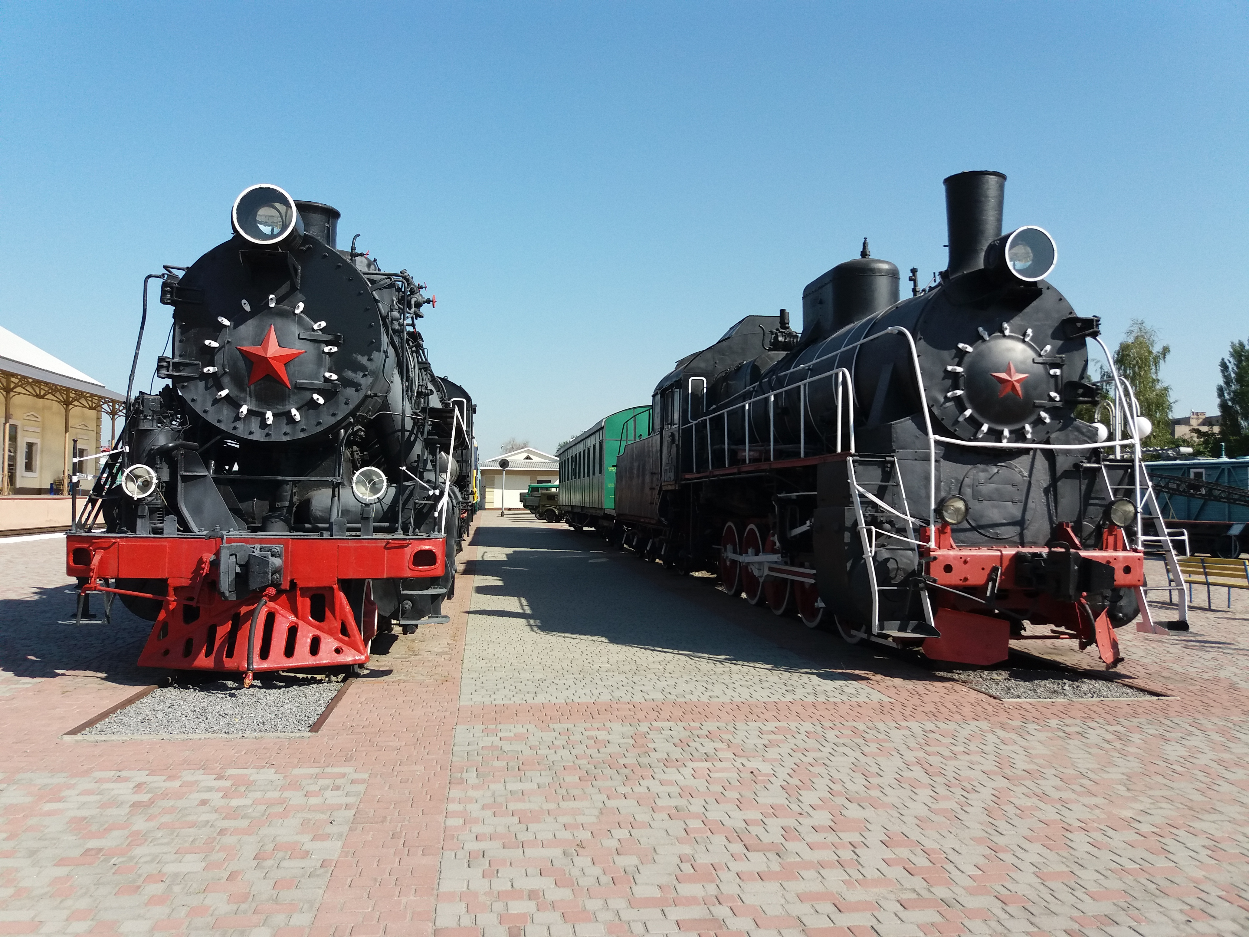 Паровози ФД20-2560 та Эр 774-40 в Музеї історії та залізничної техніки Південної залізниці